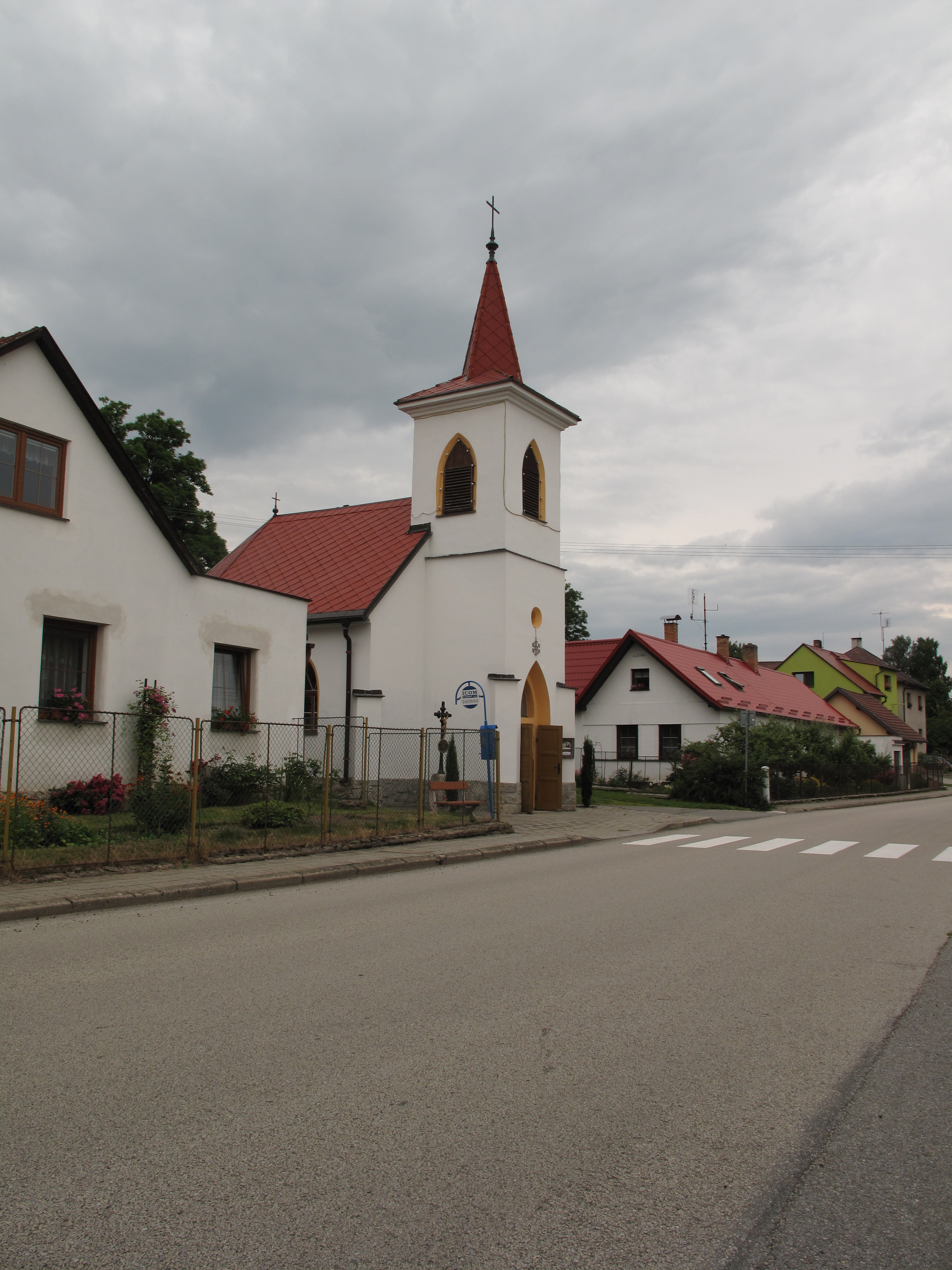 Kaplička v Horní Vsi. Okres Pelhřimov, Česká republika.